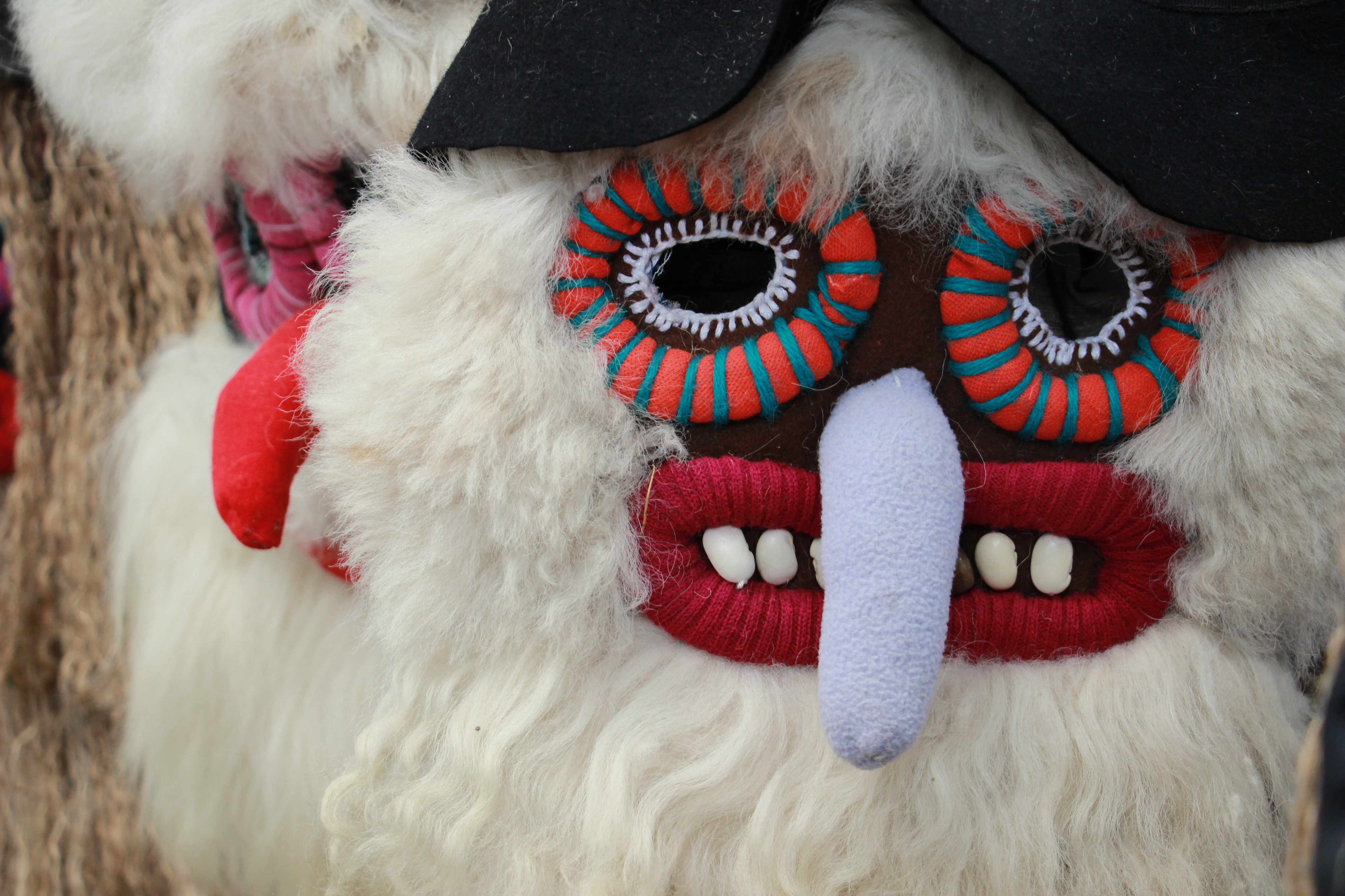 מסכות